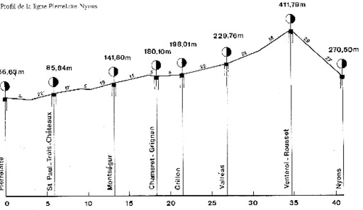 Profil de la ligne de chemin de fer de Pierrelatte à Nyons